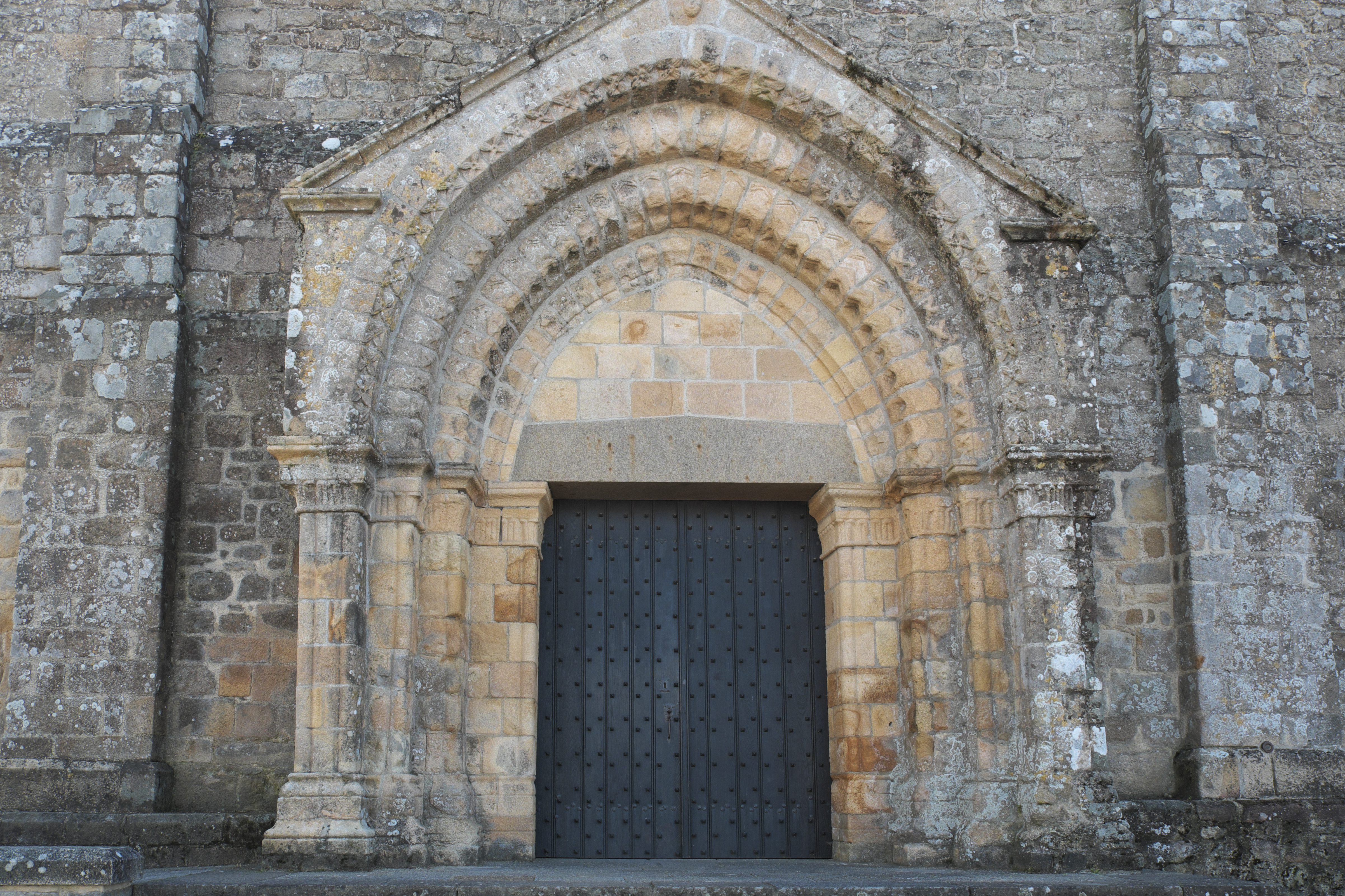 Kirche Notre-Dame-de-Joie in Merlevenez im Département Morbihan (Region Bretagne/Frankreich), Westportal